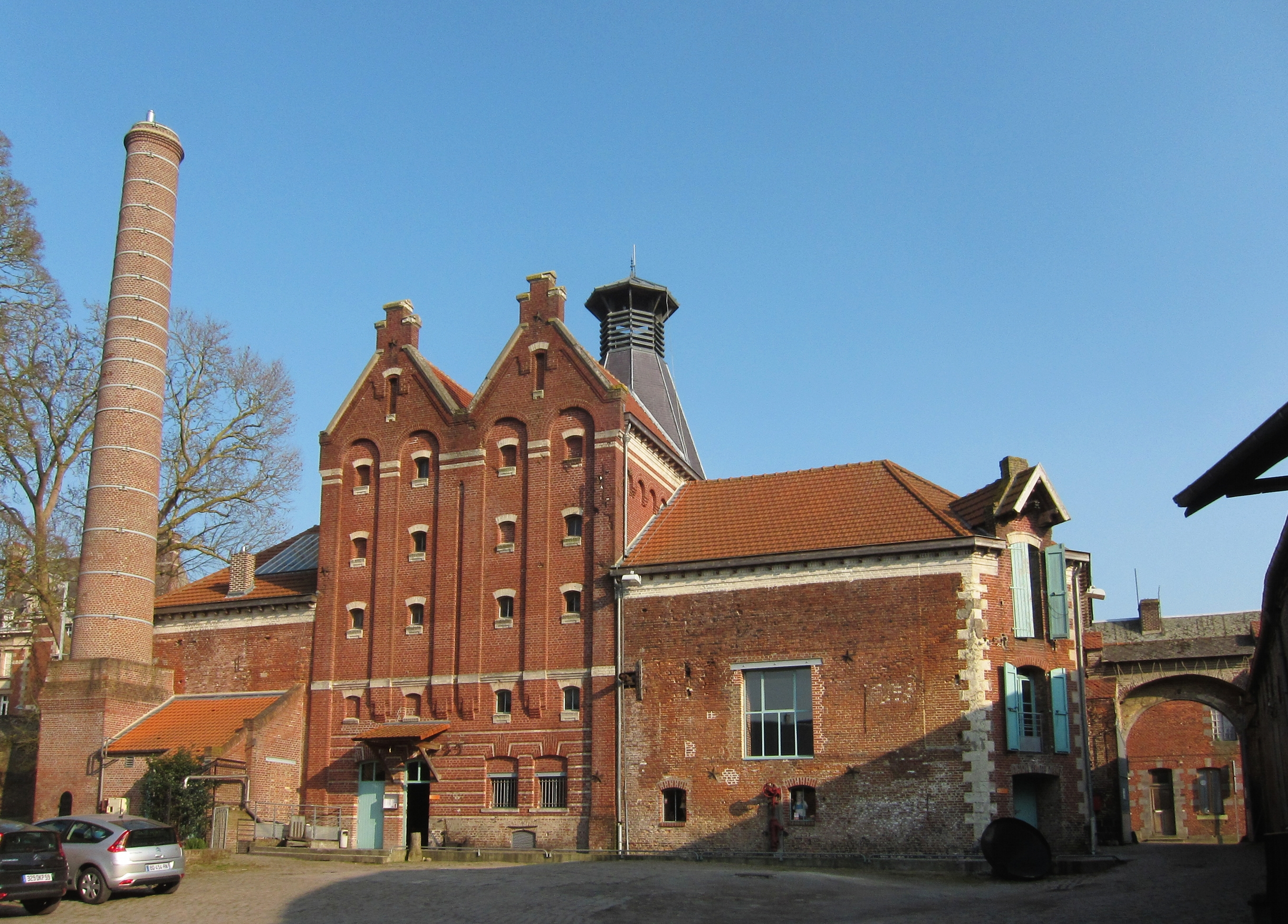 Ancienne brasserie du Cateau-Cambrésis.